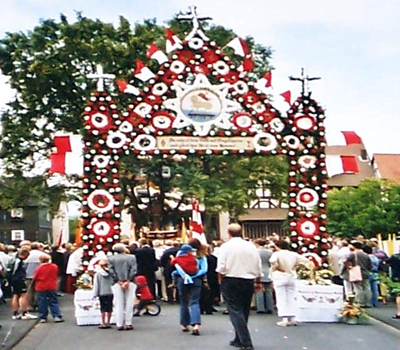 Triumphpforte zu Fronleichnam in Mardorf am 19. Juni 2003